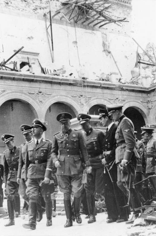 El Reichführer de la Policía Alemana nazi, Heinrich Himmler visita el Alcázar de Toledo en compañía del General Moscardo. 9296-40